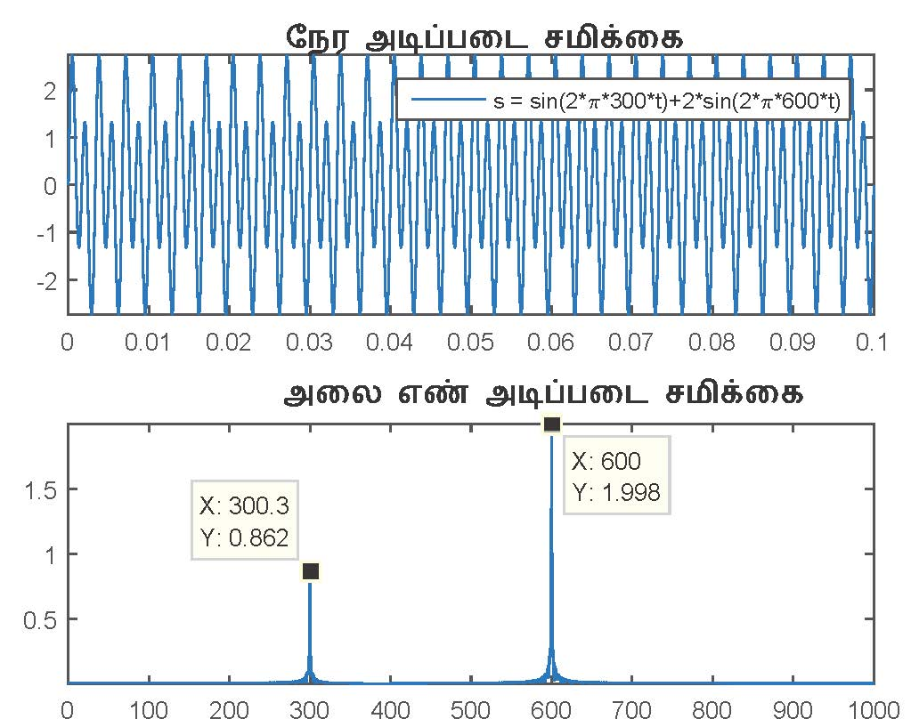 Matlab fig